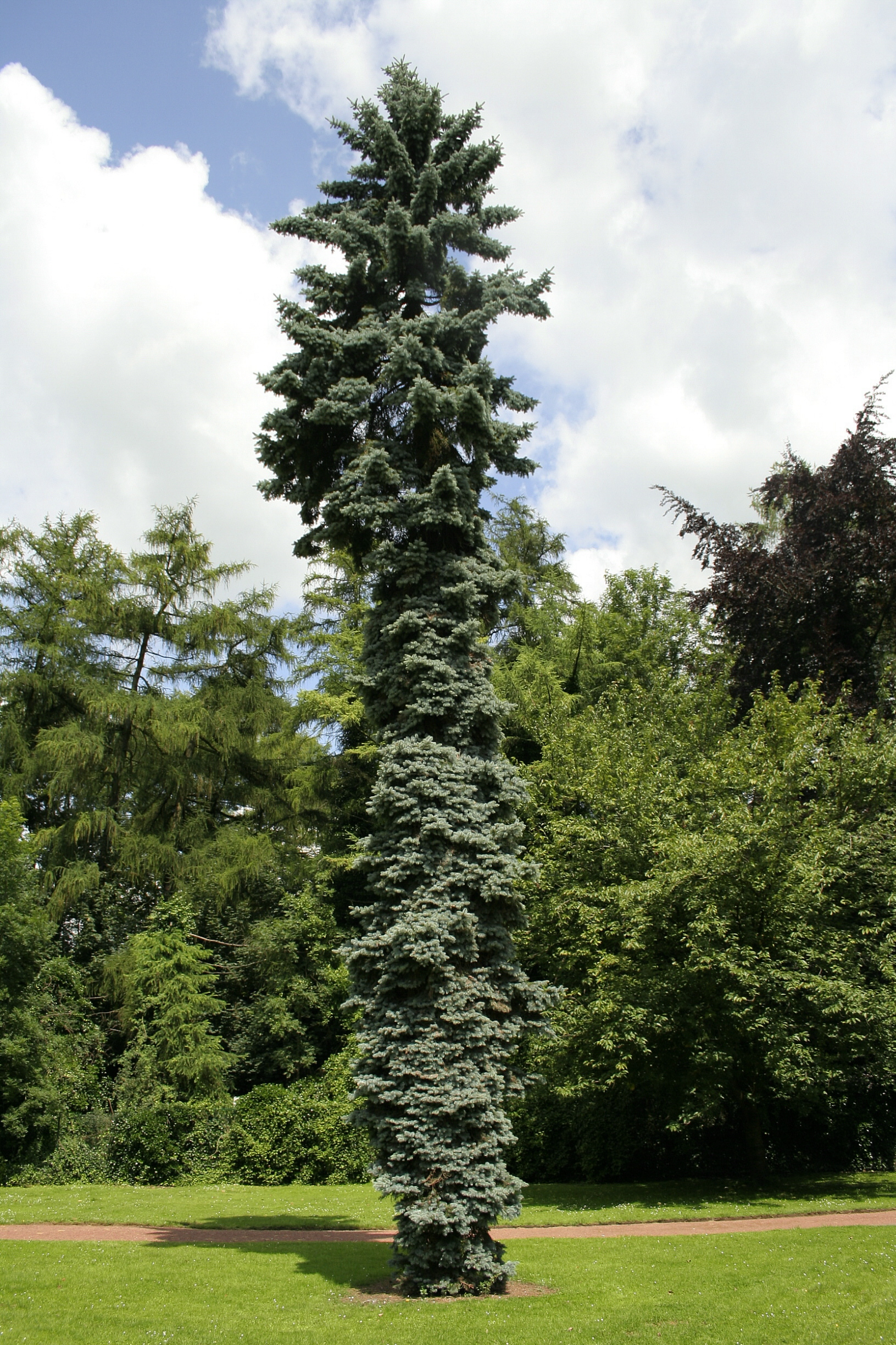 Épicéa bleu ou Épicéa du Colorado à port pleureur (Picea pungens 'Glauca pendula'). Circonférence mesurée à 1m50 du sol: 97 cm (2007) Position exacte : Morlanwelz-Mariemont (Belgique) – Parc du domaine de Mariemont.